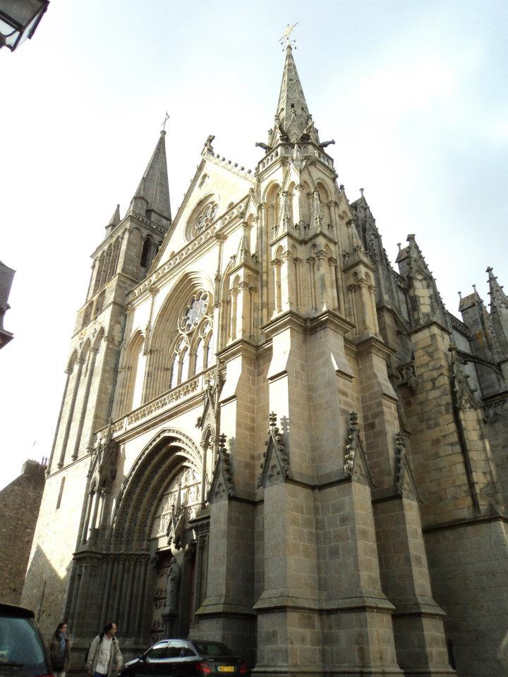 Façade de la Cathédrale Basilique Saint-pierre de Vannes